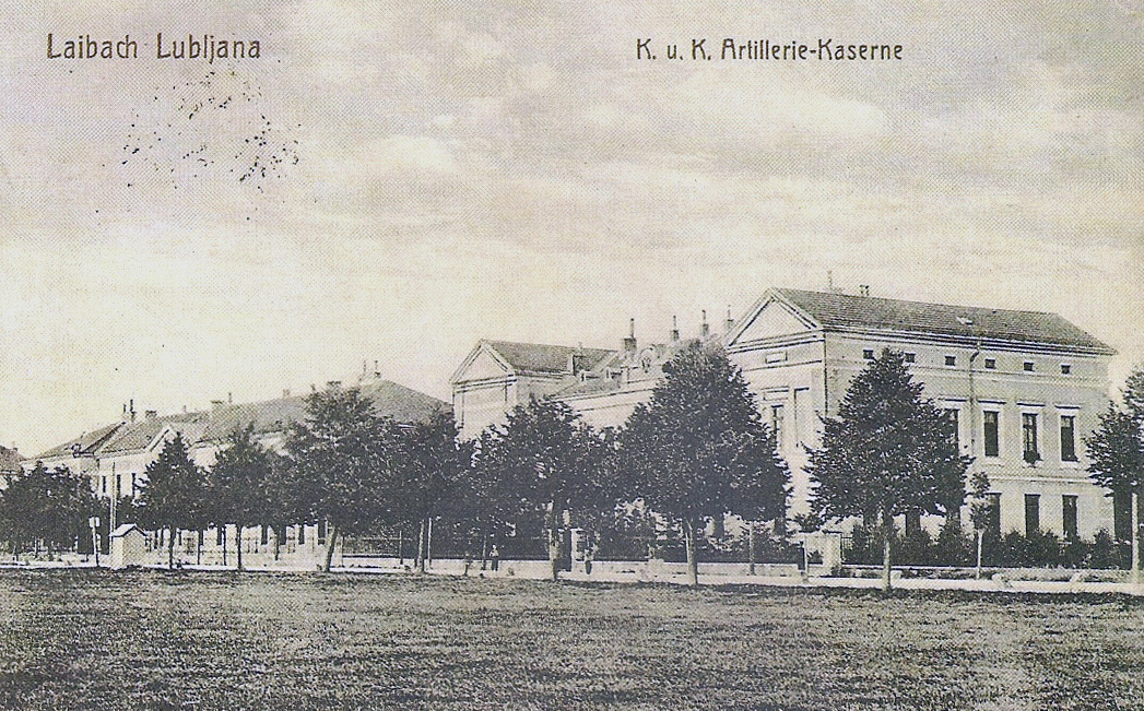 Razglednica topniške kasarne v Ljubljani.